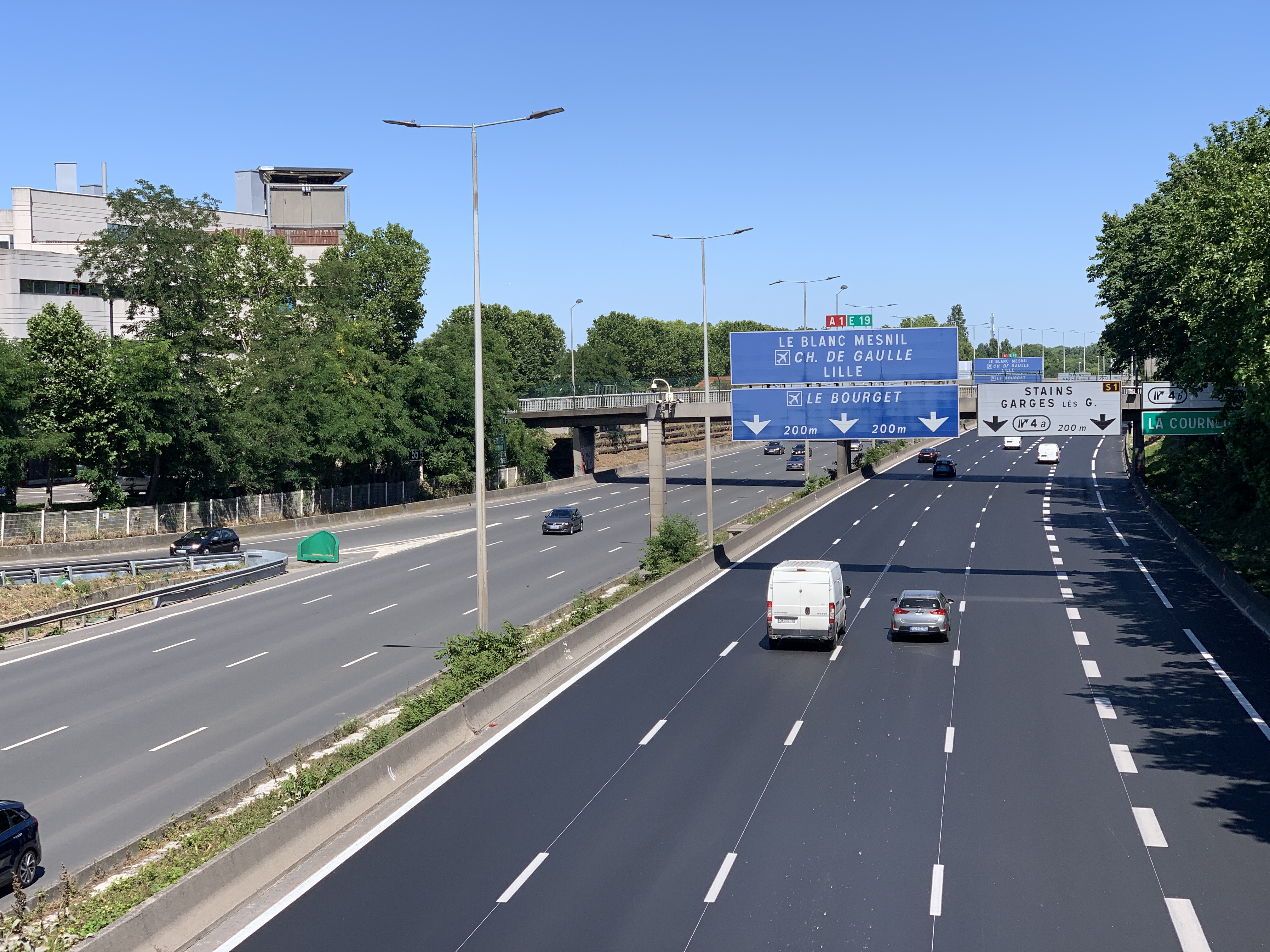 L'autoroute A1 vue depuis la route de La Courneuve, Saint-Denis, Seine-Saint-Denis.